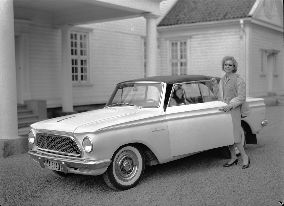 Wenche Foss med bil ved Prinsessealléen 20, 11. mai 1962